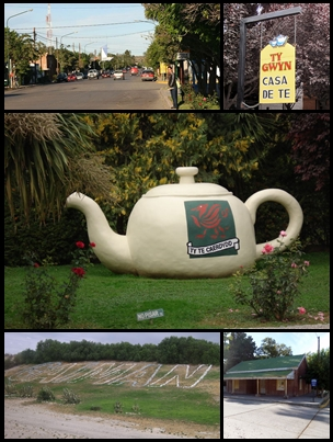 Montaje de Gaiman, Patagonia Argentina